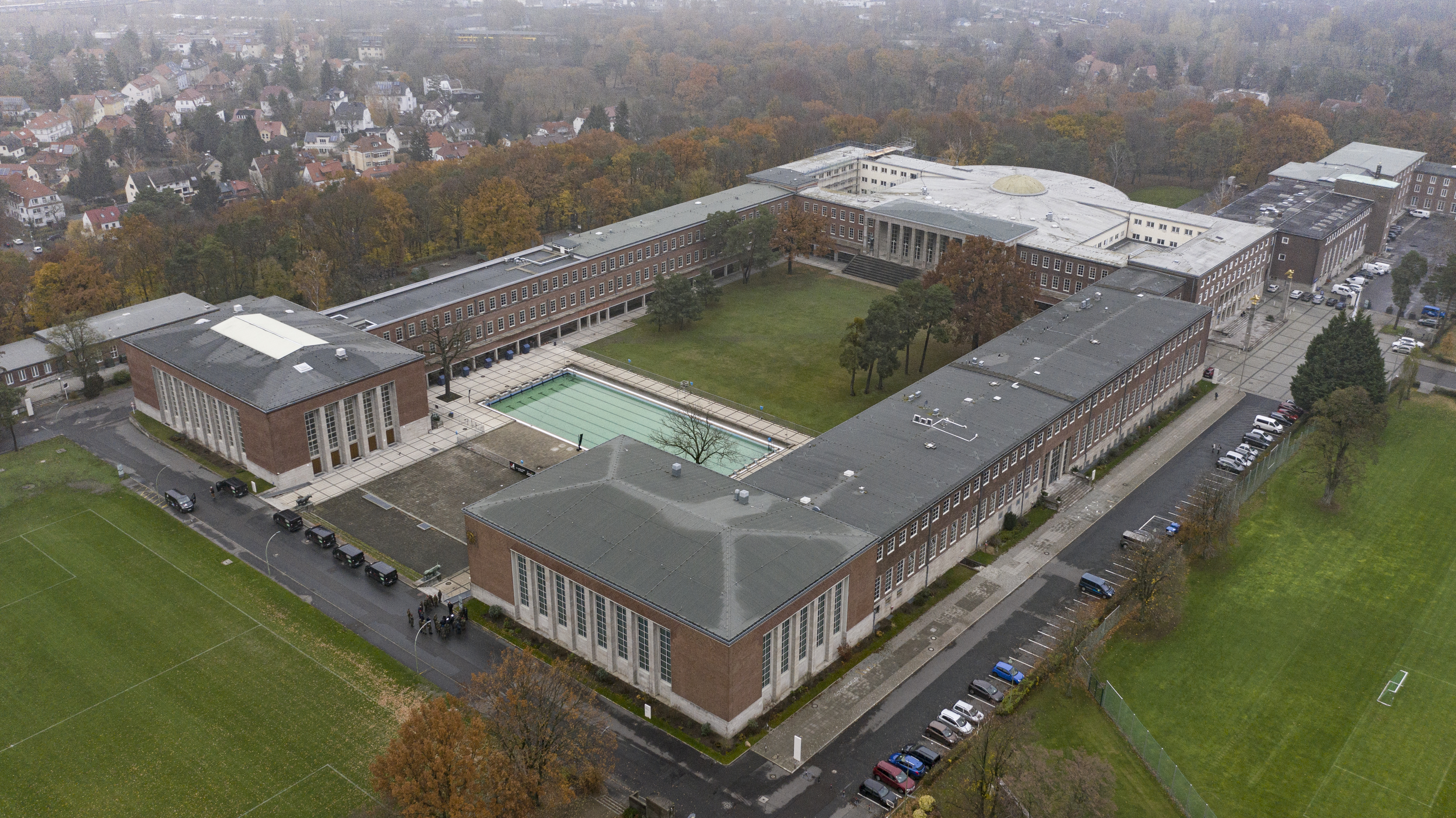 Template:Deutsches Sportforum